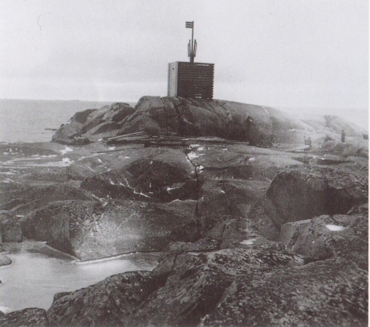 Bengtskärin majakkaa edeltänyt "Bengtskärin saarnatuolina" tunnettu tunnistusmajakka, joka purettiin lokakuussa 1906.